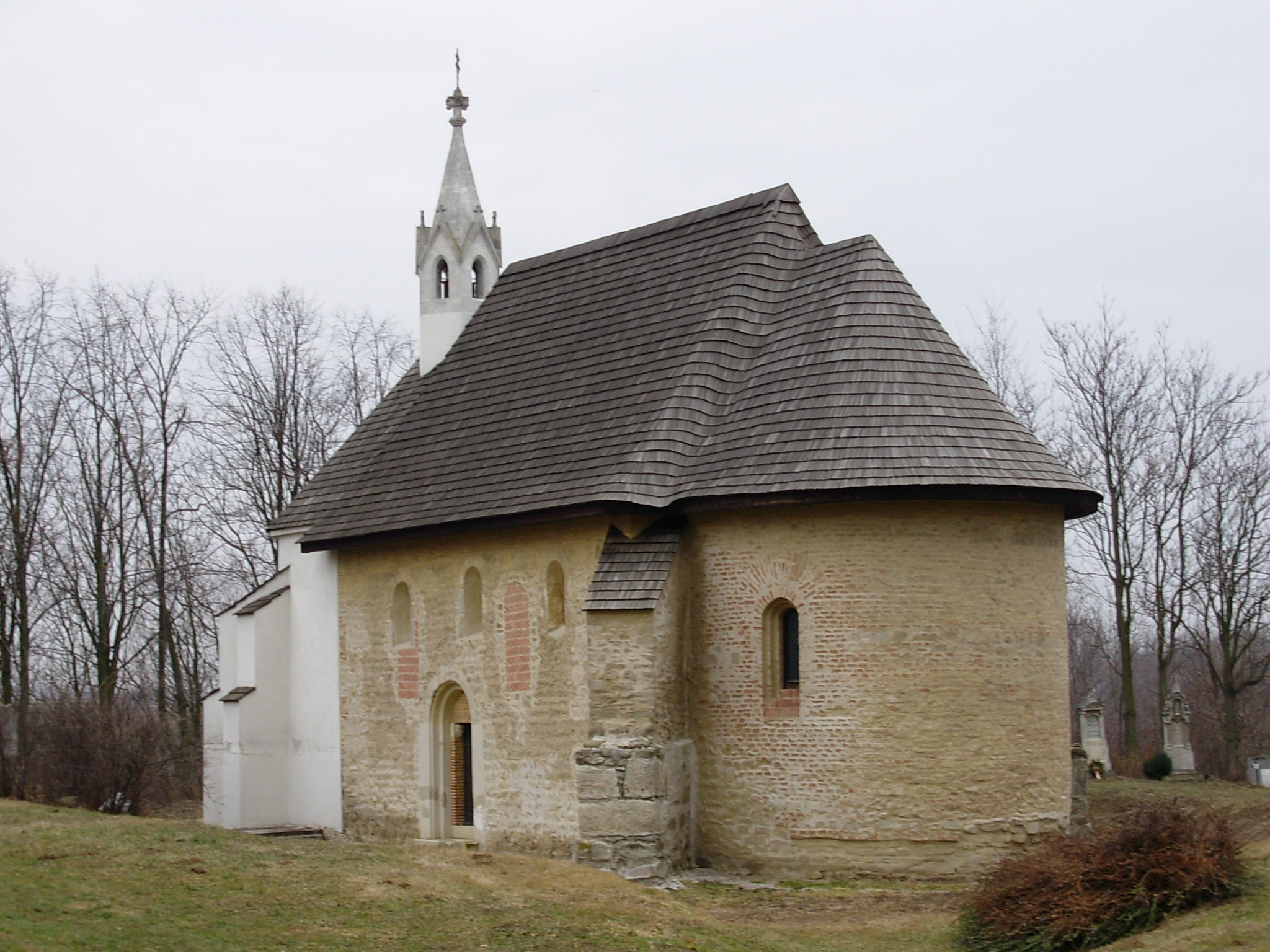 Nagylózs. Szent István római katolikus temetőkápolna. Téli fotó. This is a photo of a monument in Hungary. Identifier: 4611